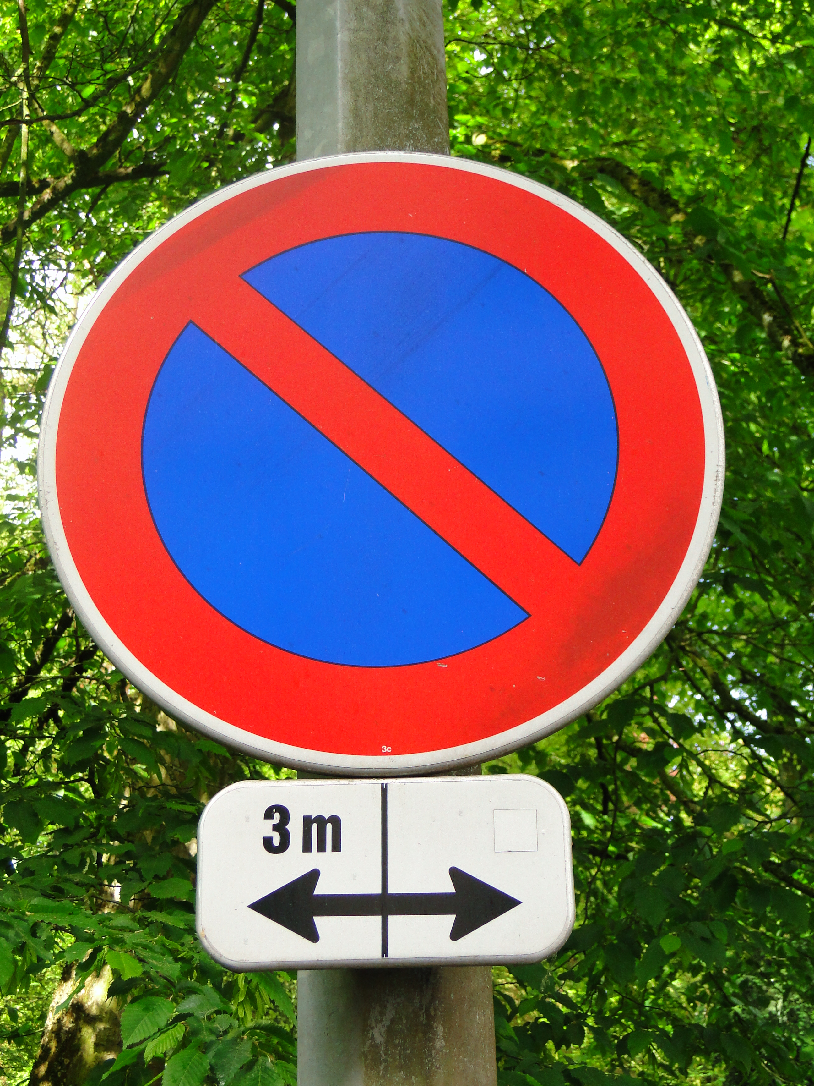 Verkéiersschëld C,18 aus dem Lëtzebuerger Code de la route mam Zousazschëld Modell 3d